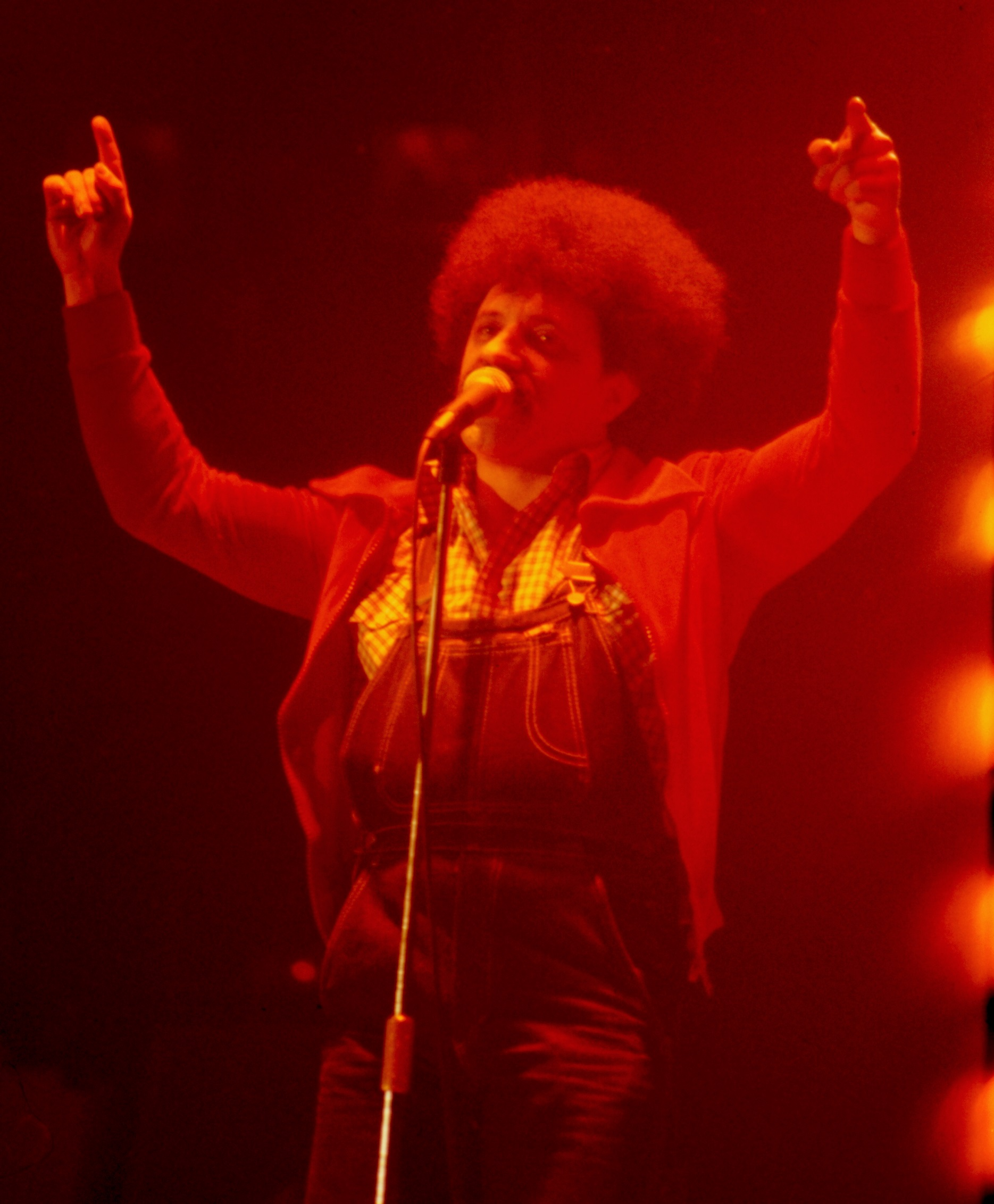 Želimir Altarac Čičak u sarajevskoj "Slogi" 1978 godine